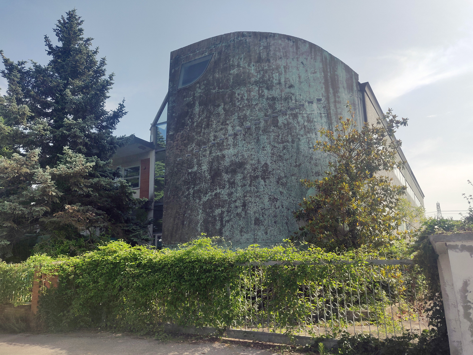 La sede di Via Delle Rose a Sain Giovanni in Marignano nel giugno 2019